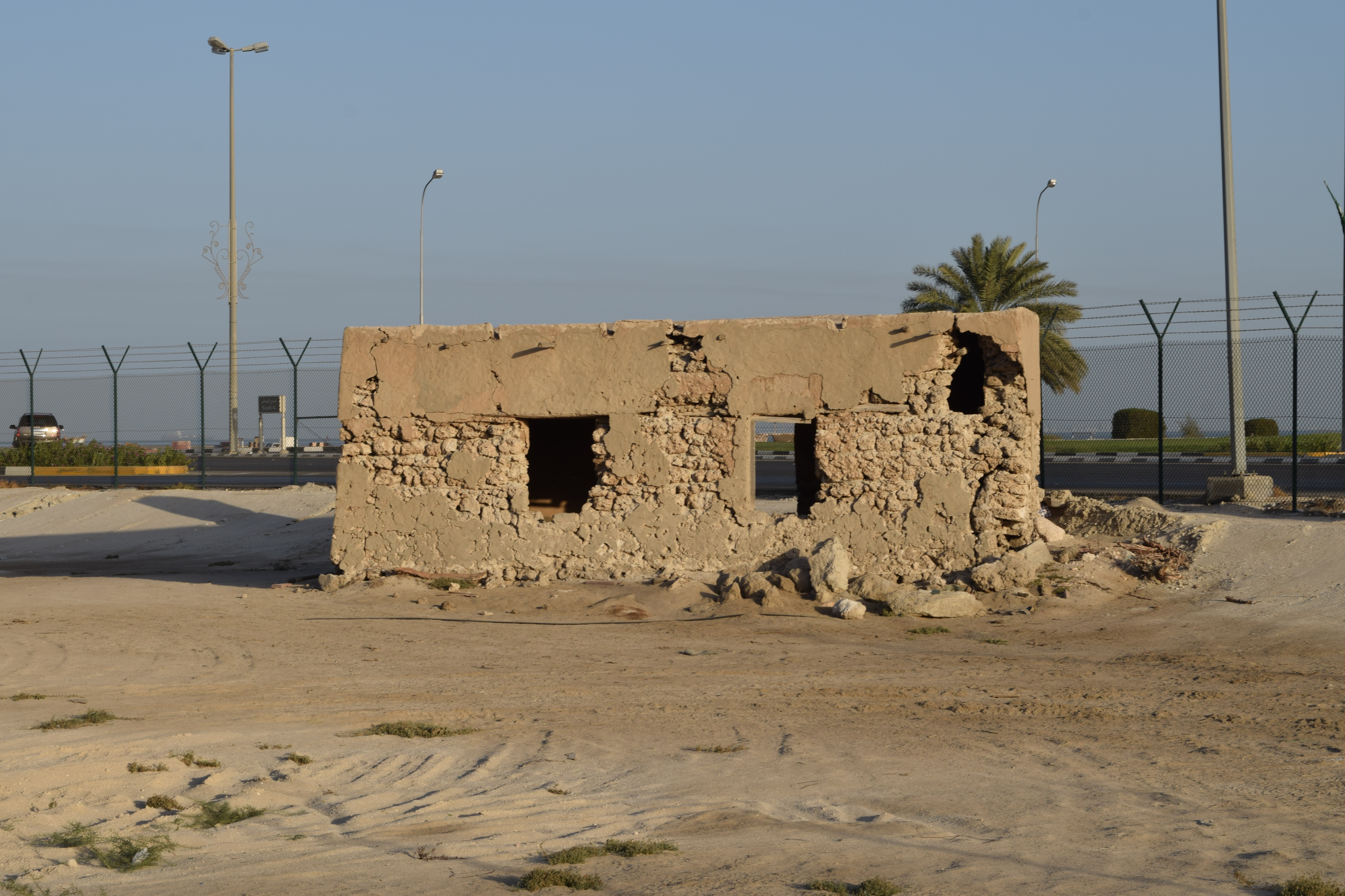 صورة خلفية لمطار دارين